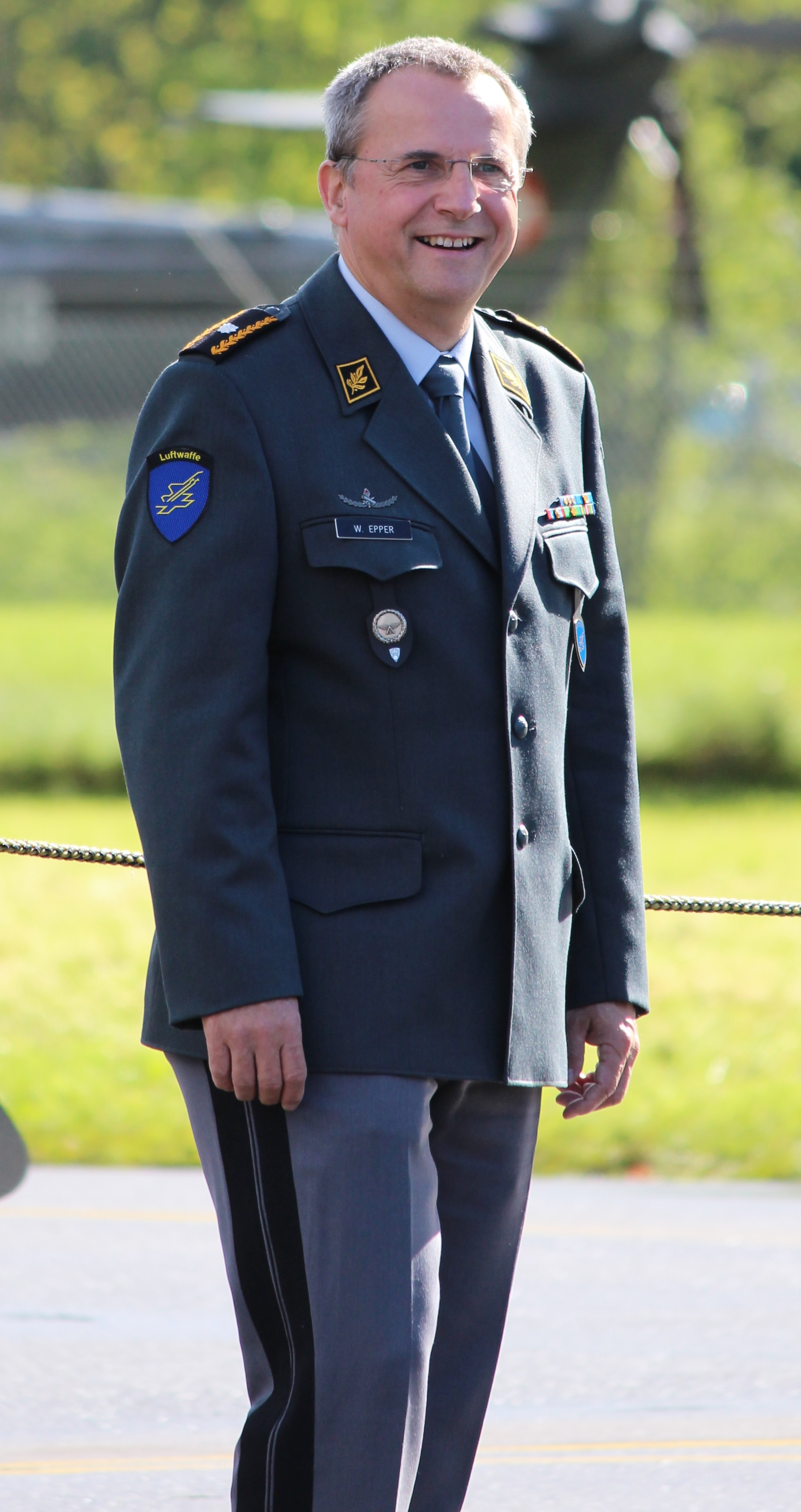 Werner Epper anlässlich des Jubiläums 75 Jahre Militärflugplatz Alpnach